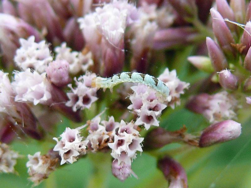 Chloroclystis v-ata, larva. Location: The Netherlands - Ooltgensplaat - Het Groote Gat e.o.